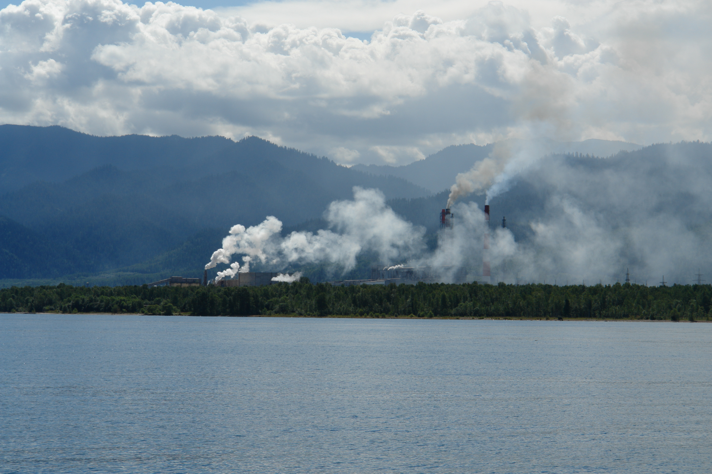 Байкальский ЦБК